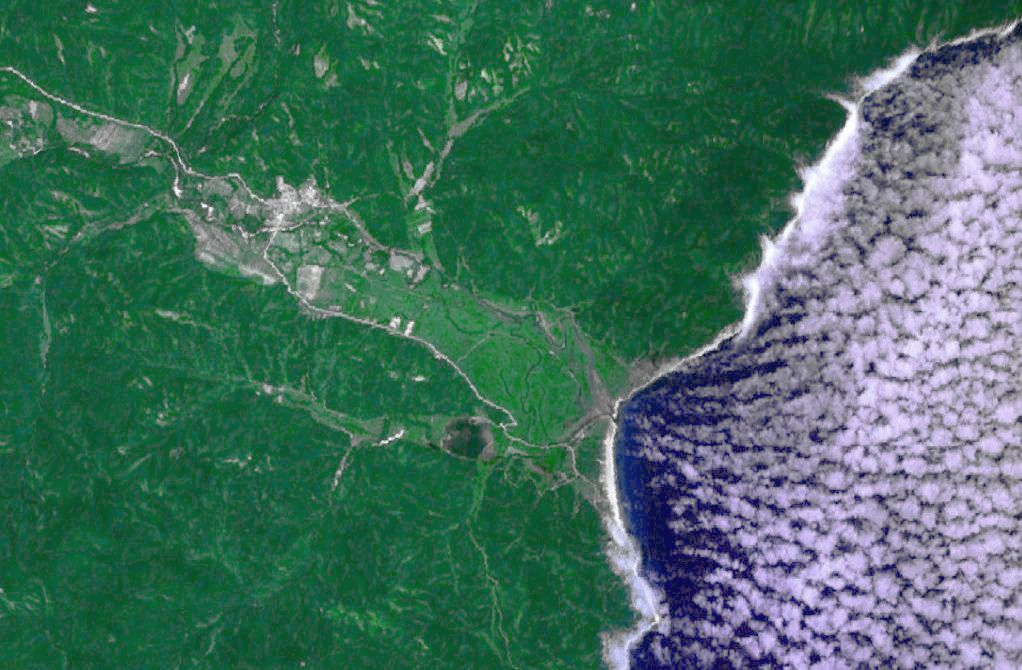 Бухта и река Зеркальная, Приморский край.